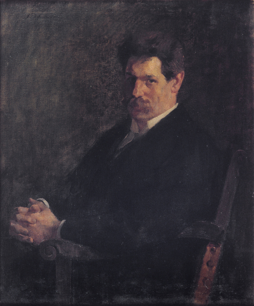 Huile sur toile96 x 80,5 cm